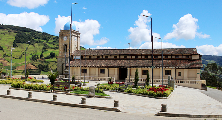 Iglesia principal de la parroquia rural San Andrés de Taday, en el cantón Azogues.